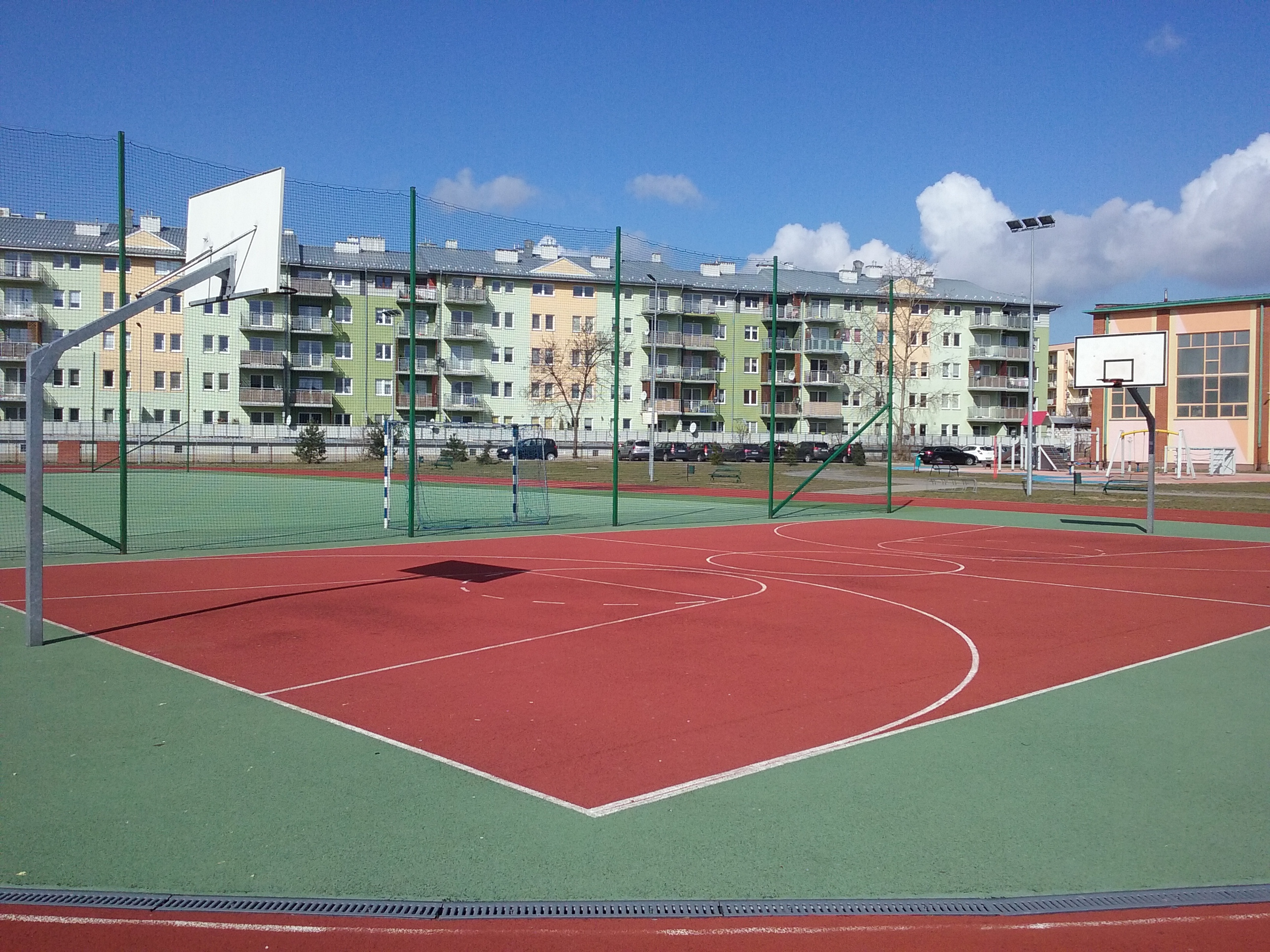 Ogólnodostępne boisko do gry w koszykówkę w 60-tysięcznym Tomaszowie Mazowieckim w województwie łódzkim, PL/EU, CC0